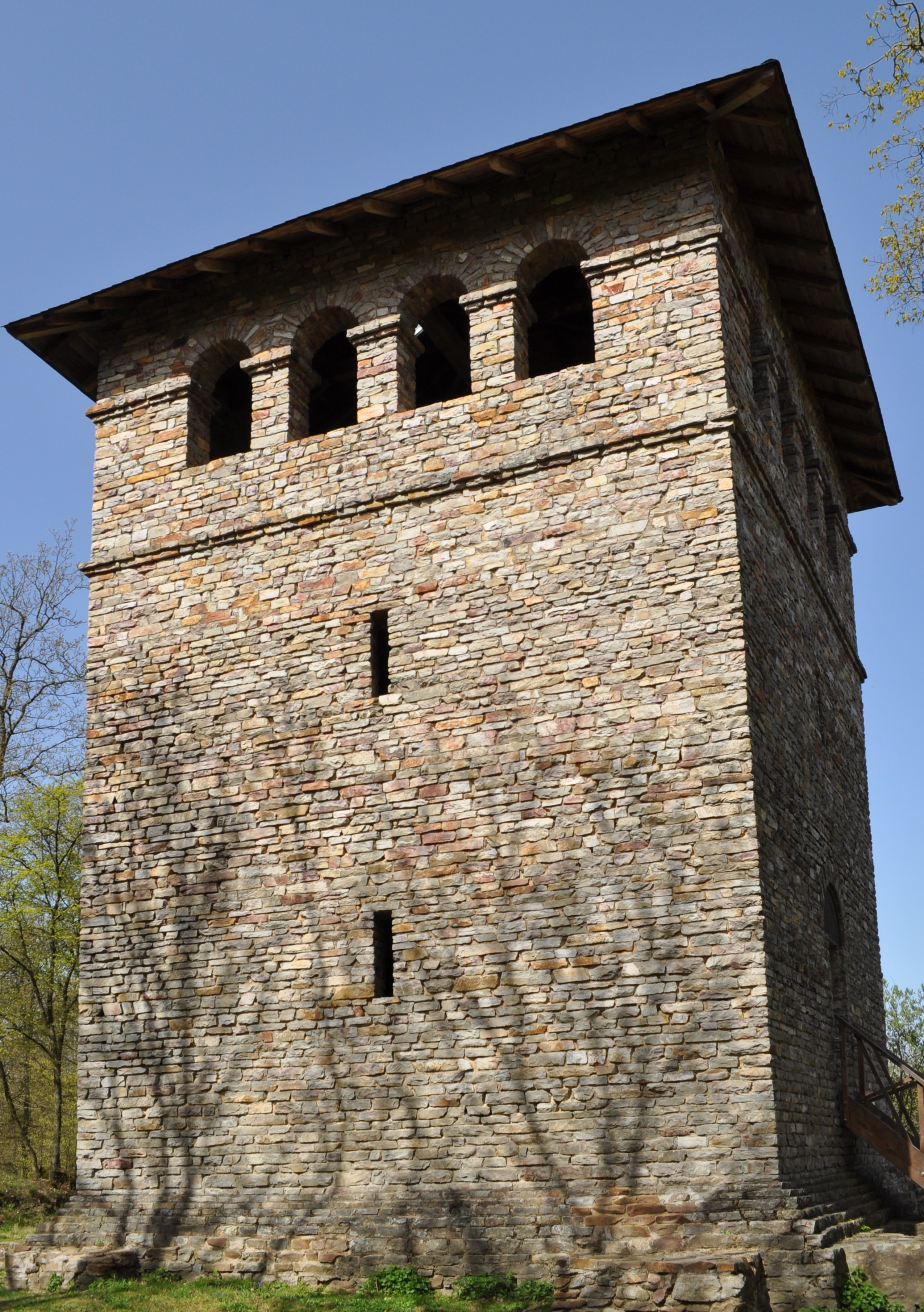 Römischer Wachturm WP 4/16 auf dem Gaulskopf